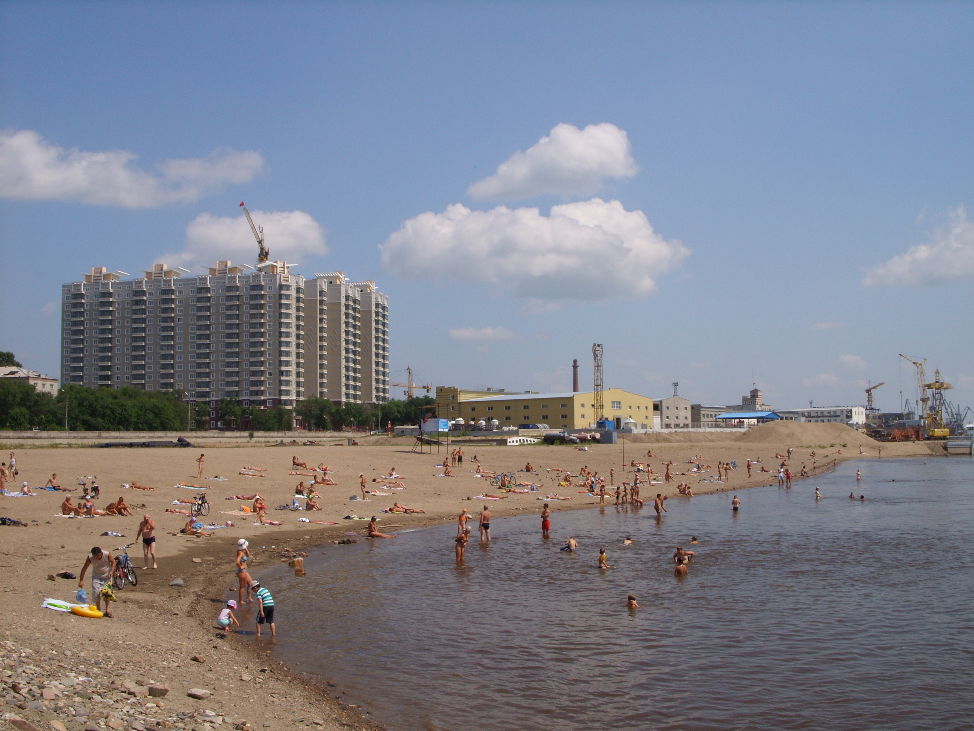 Амурская область, Россия. Снимки августа 2011 г.